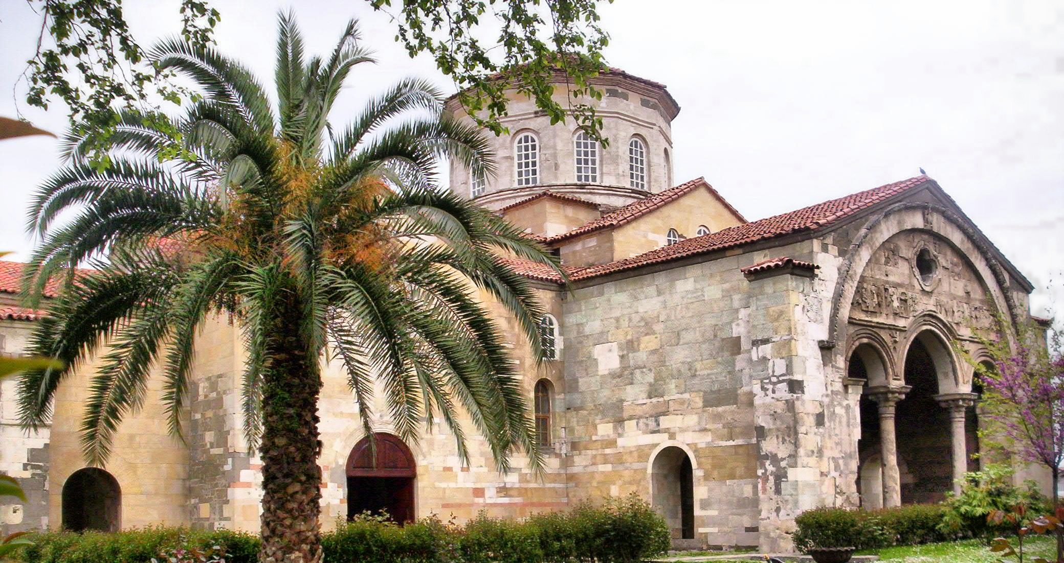 AYASOFYA MANASTIRI